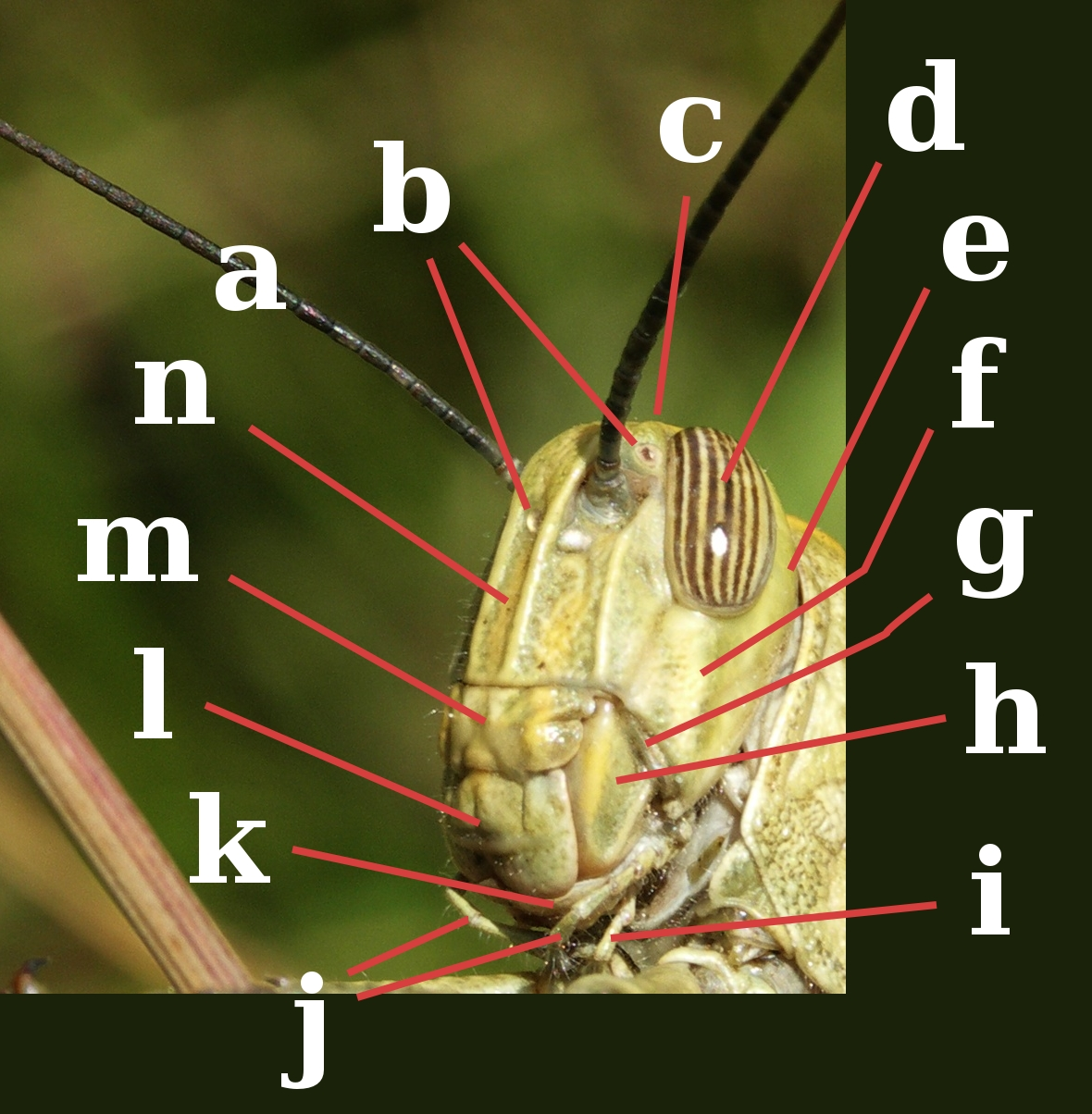 see legend below